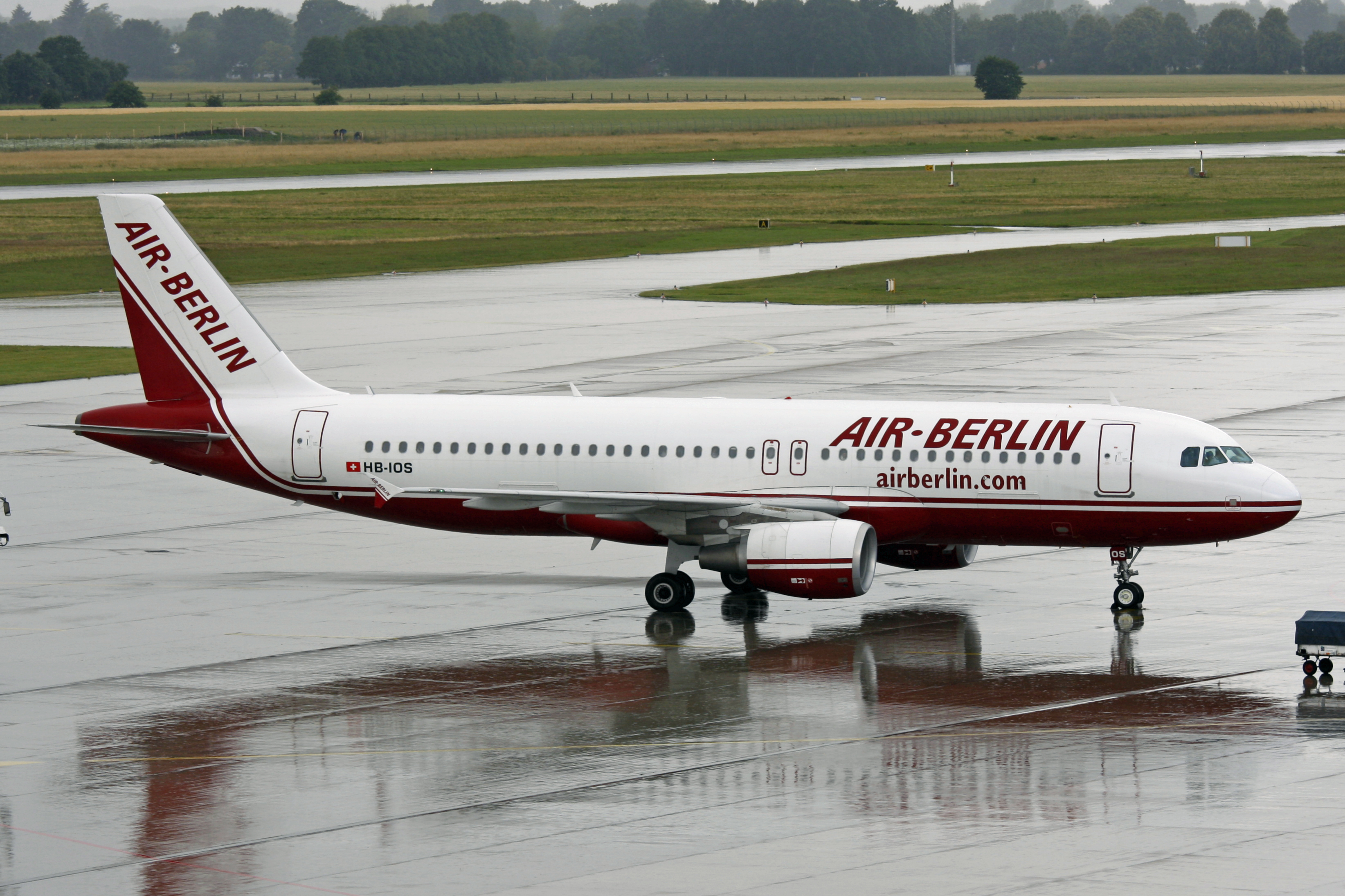 Haj / Eddv 20-06-09 hb-ios